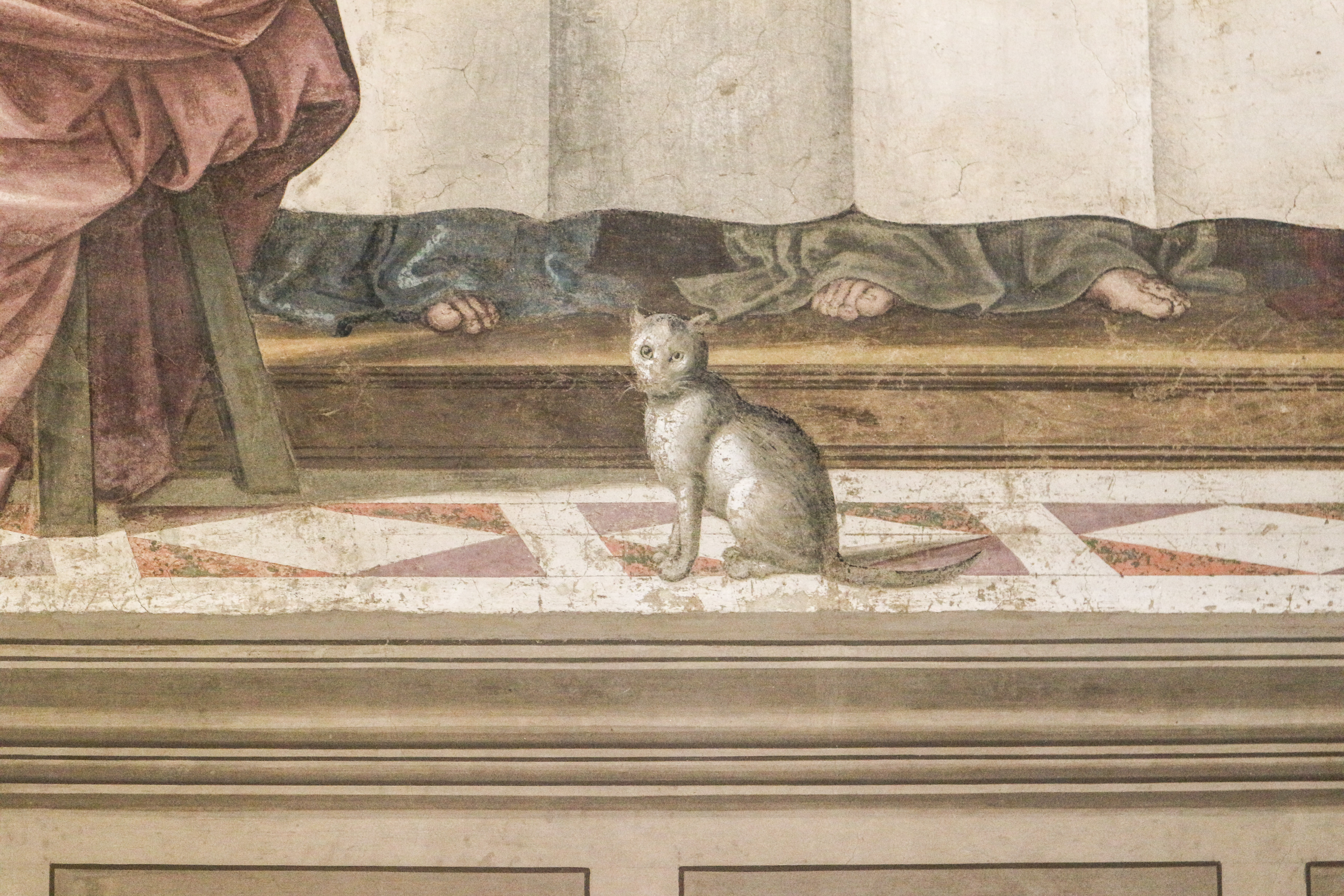 Gatto del Cenacolo di San Marco del Ghirlandaio, Firenze, Museo di San Marco